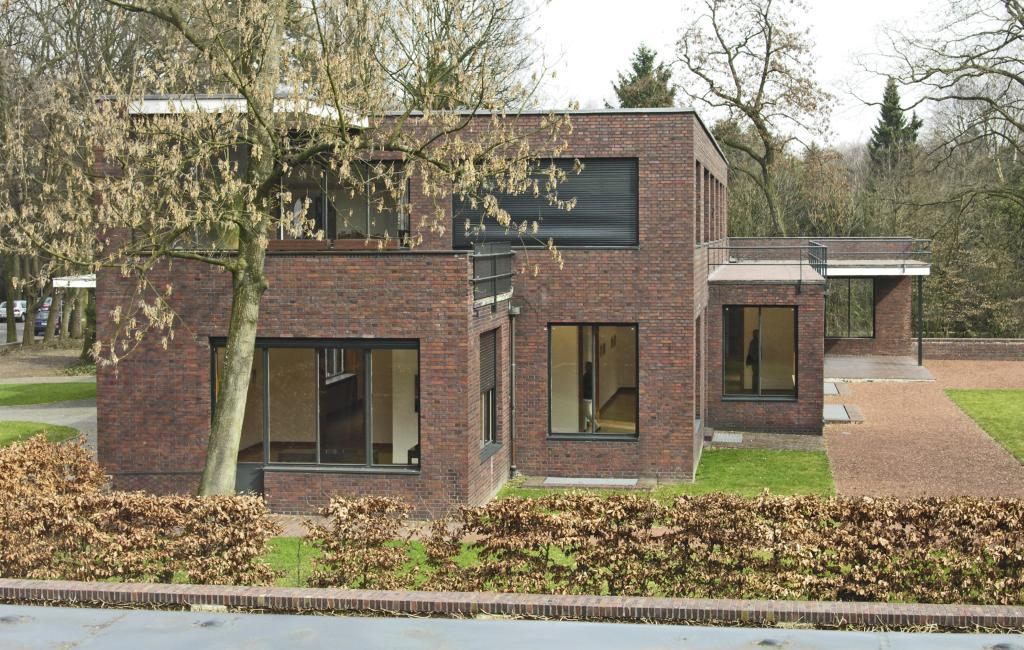 Haus Esters, Krefeld, Westfassade